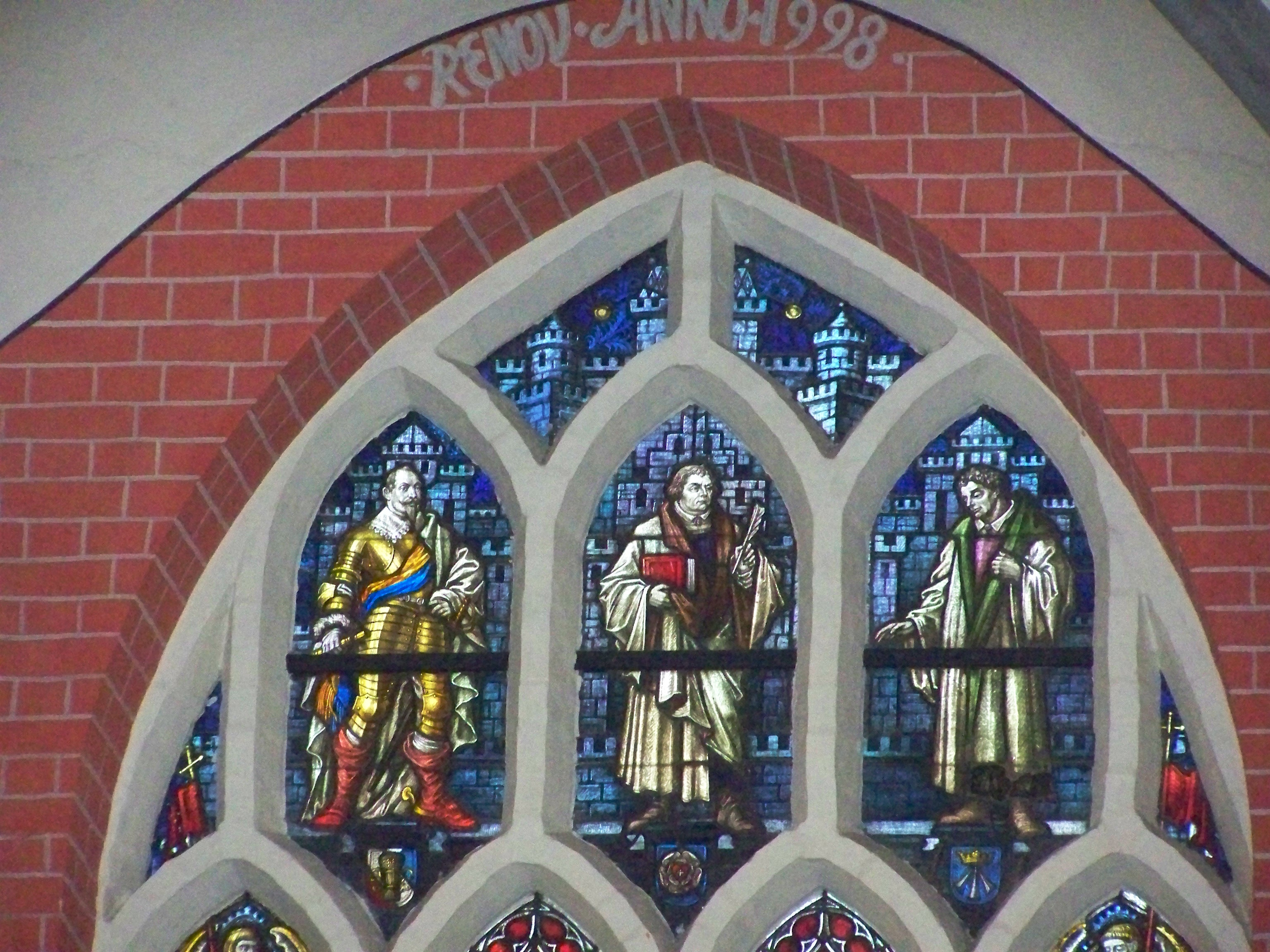 Ein Glasfenster über dem Altar der Heilgeistkloster zeigt in Buntglas Schwedens König zur Zeit der Reformation sowie Martin Luther und Christian Ketelhodt (beide Refeormatoren).